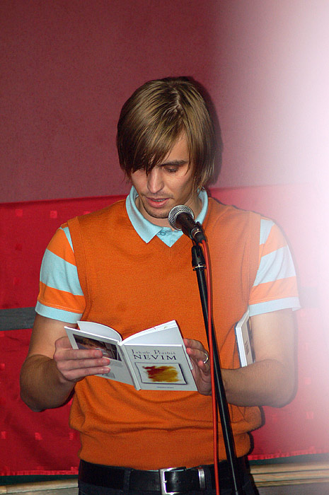 autorské čtení